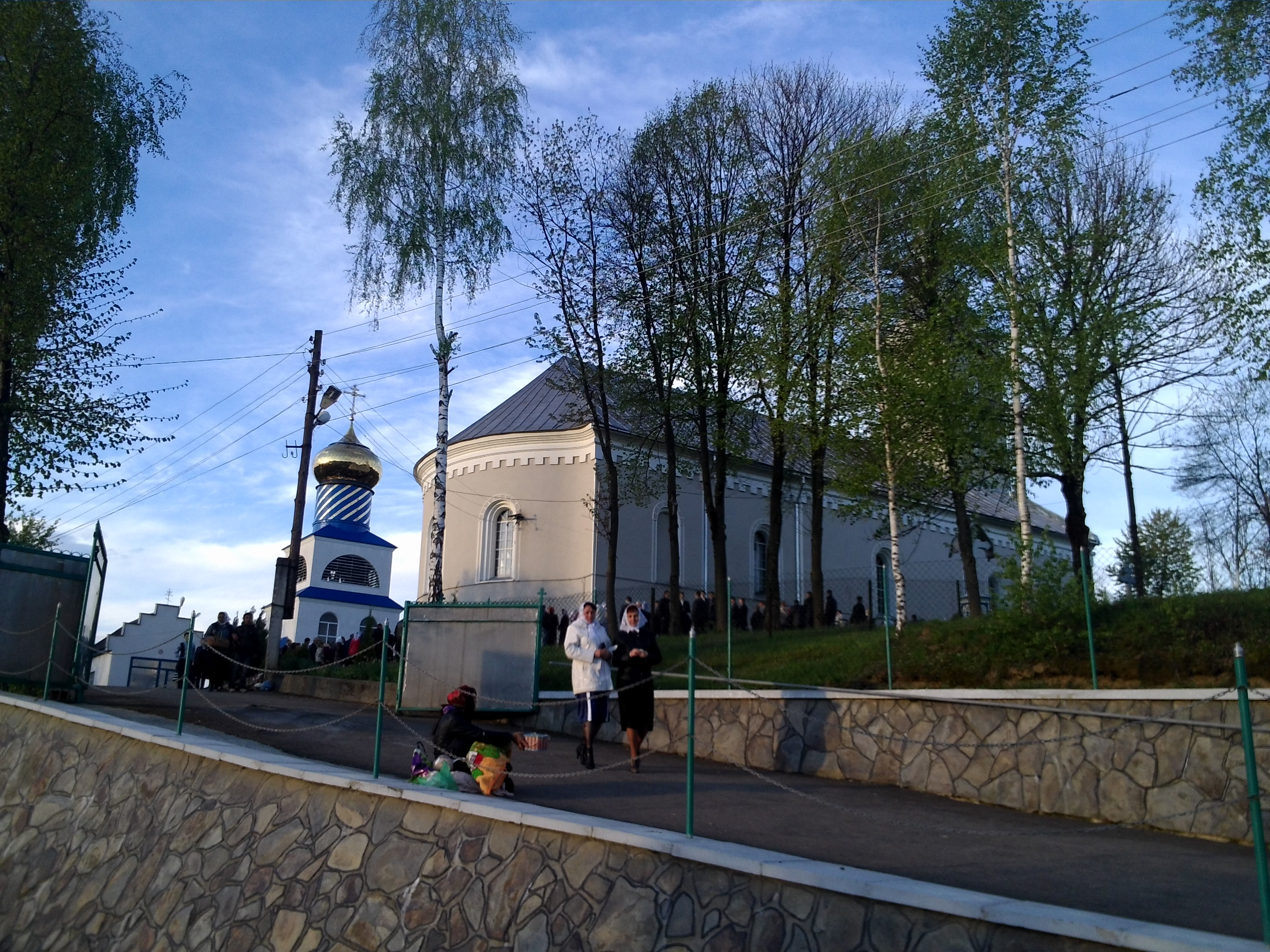 Церква в с. Угля